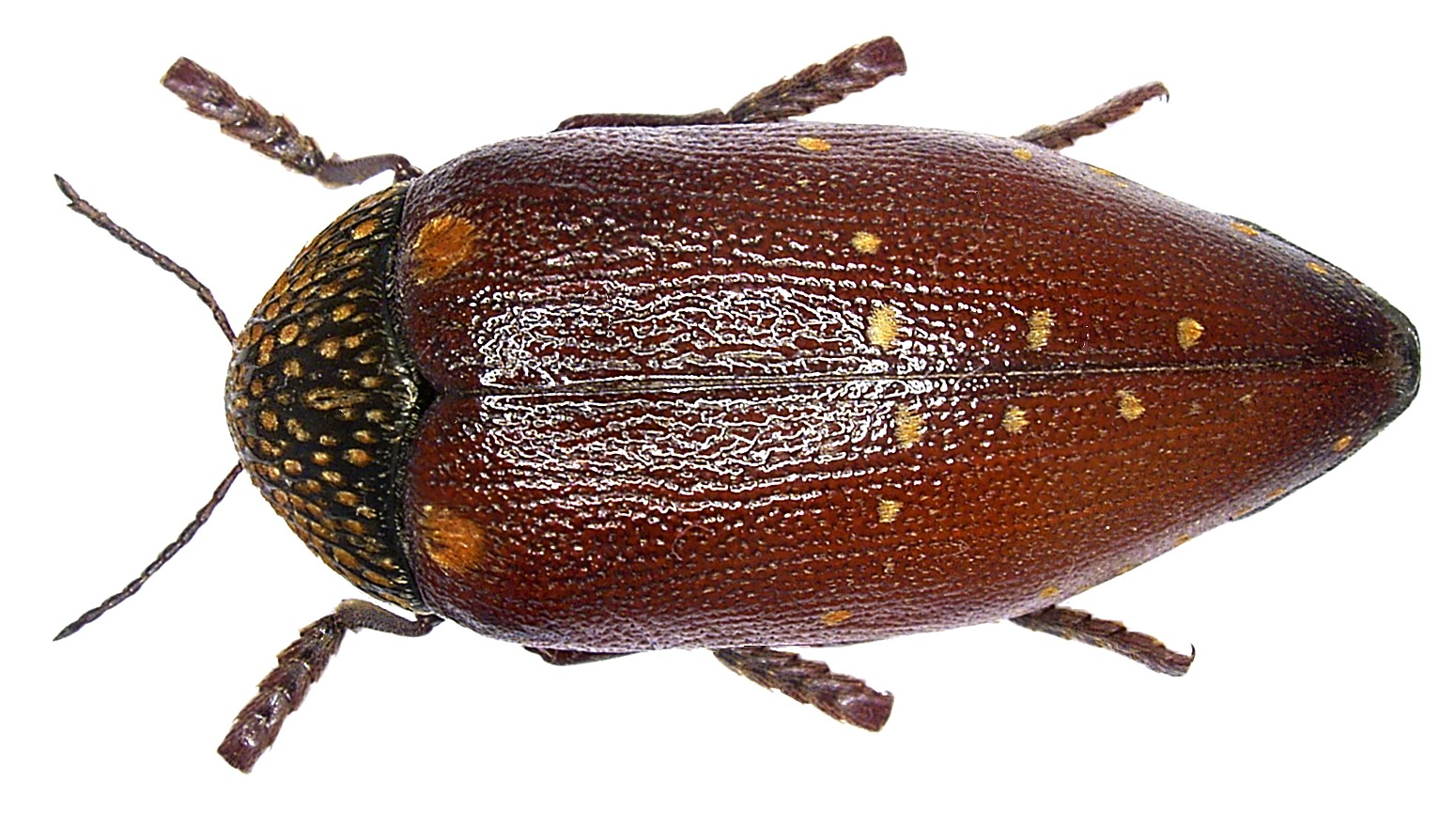 Familie: Buprestidae Grösse: 36-49 mm Verbreitung: Westafrika, Ostafrika Fundort: Senegal, M`Bour leg.det. U.Schmidt, 1992 Foto: U.Schmidt, 2006